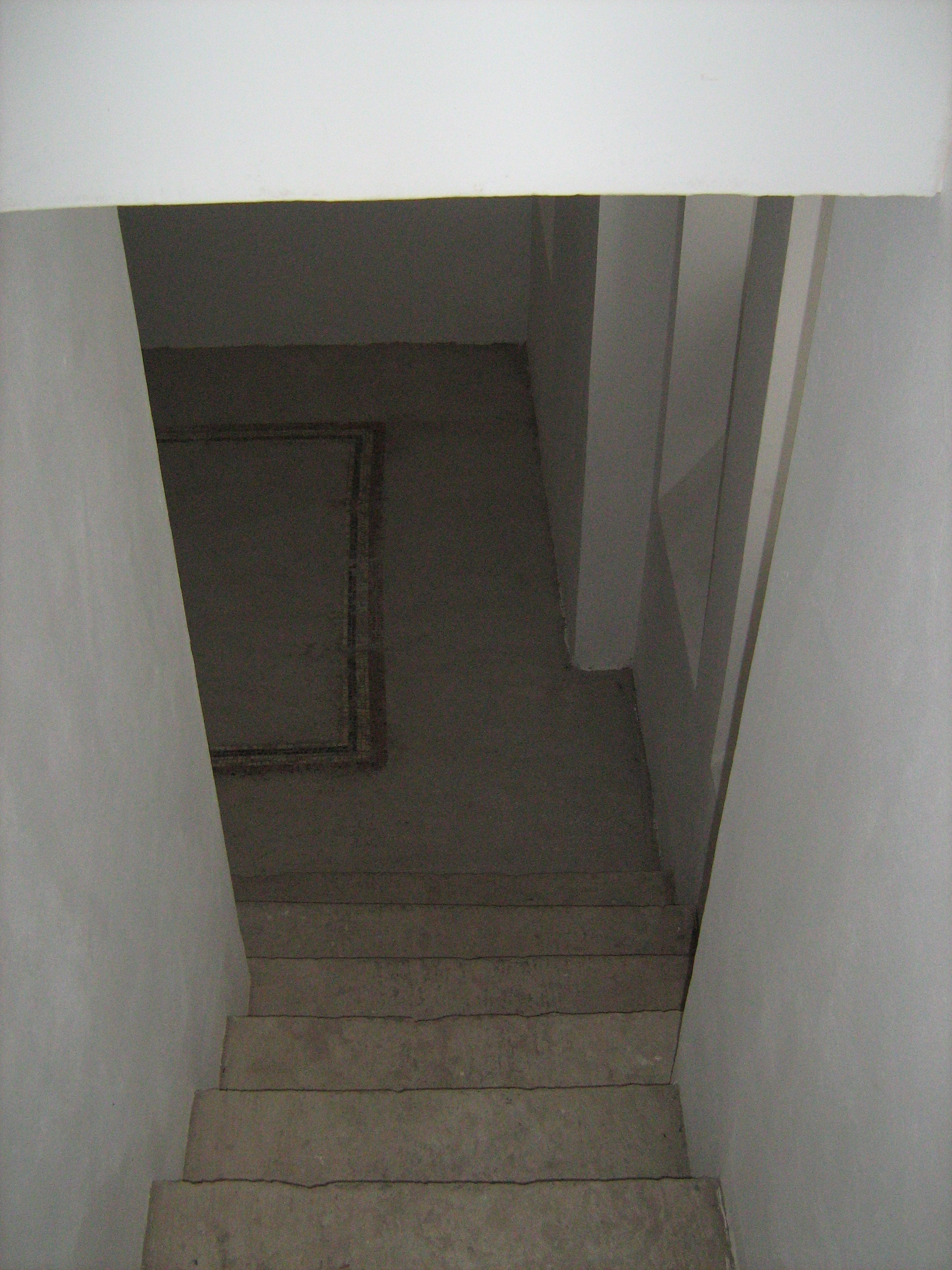 Часовня-усыпальница Светлейших Князей Юрьевских на Казанском кладбище Царского Села(г.Пушкин).Лестница в крипту.Нижний марш.После реставрации